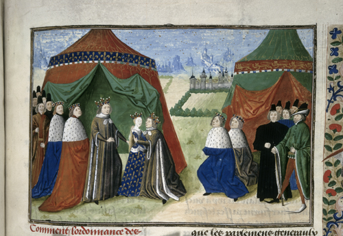 enluminure des Chroniques de Froissart